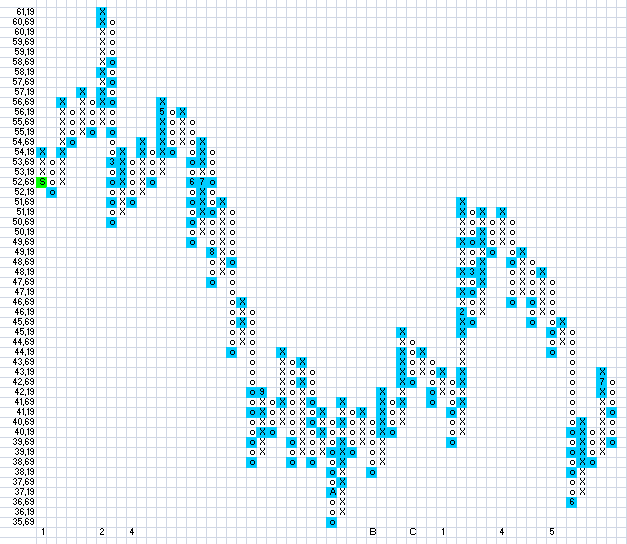 Point&Figure-Chart der Aktien der Deutschen Börse AG im Zeitraum 01.01.2011-31.07.2012 Boxisize:0,5 Reversal:3